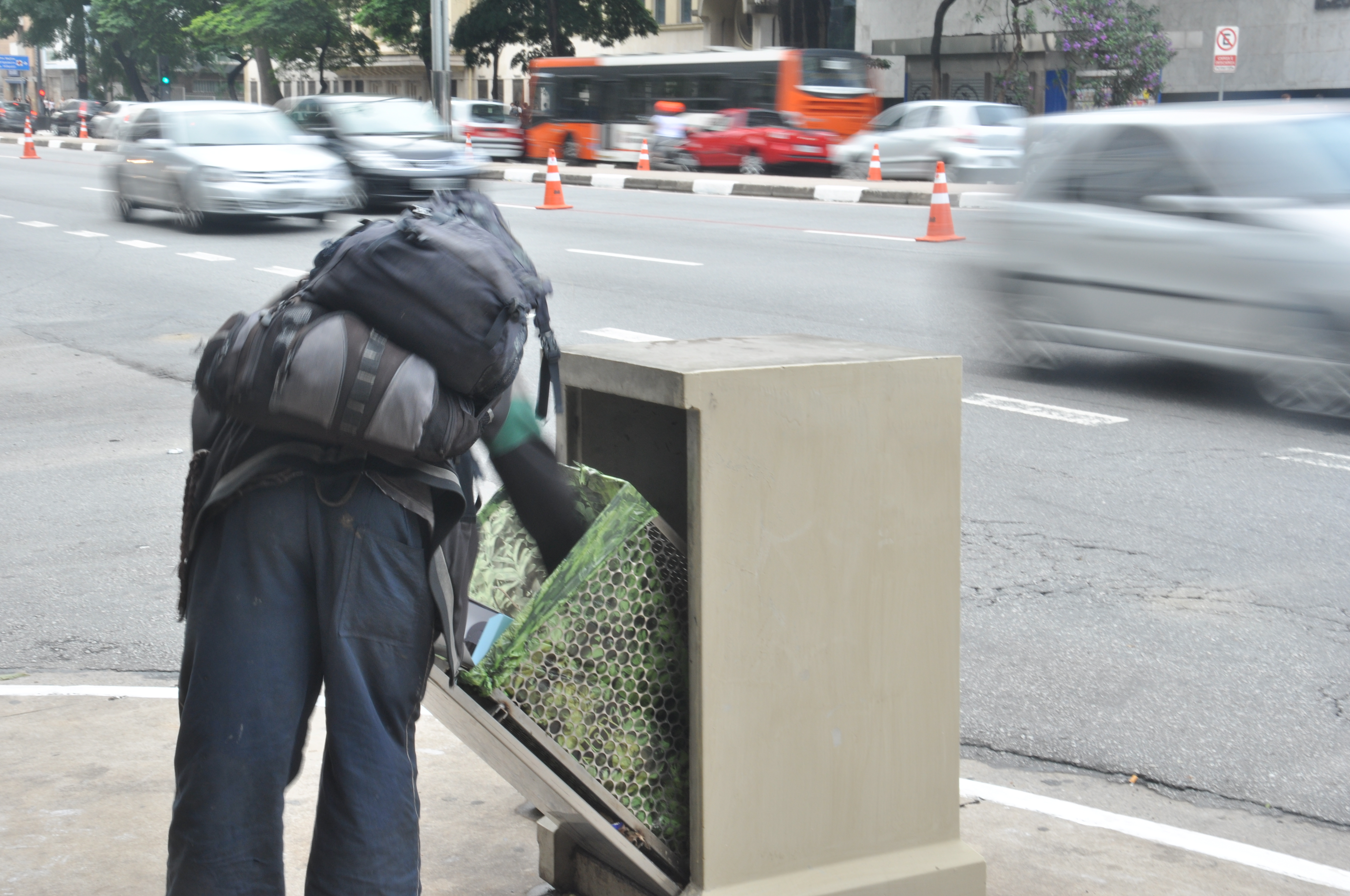 RENATA MELISSA FERREIRA 3ºPPC 12001142